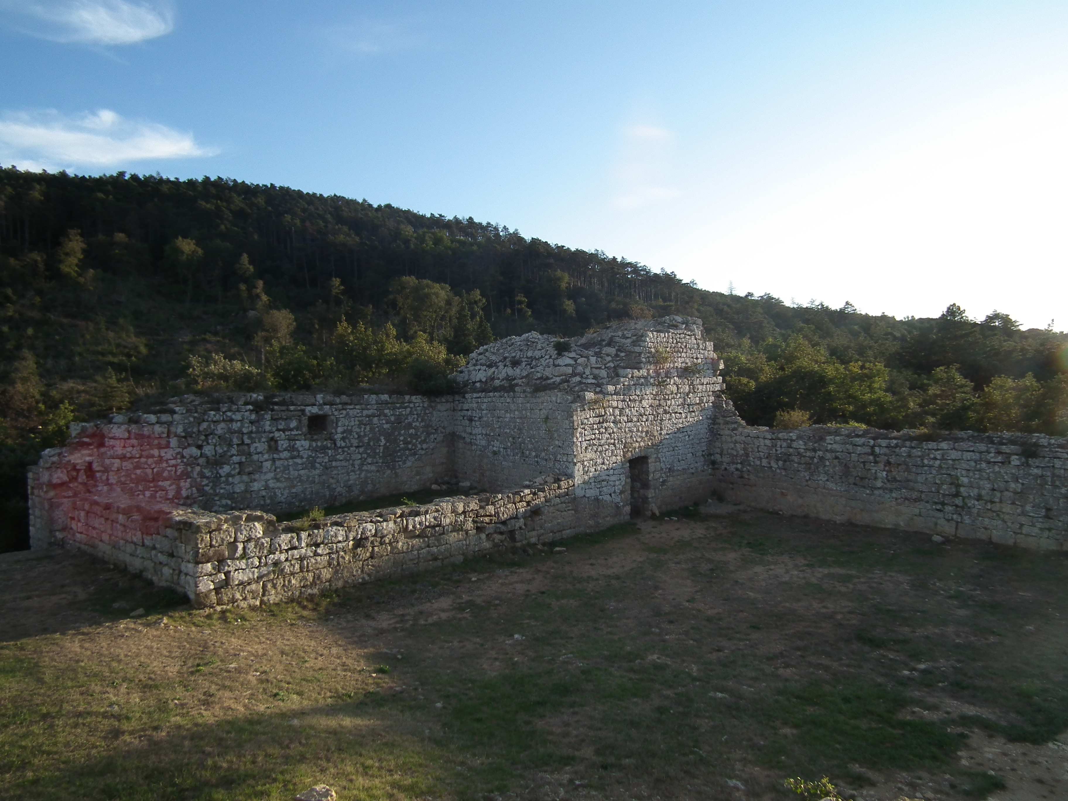 Localisation: 43°10'14"N 2°30'00"E .